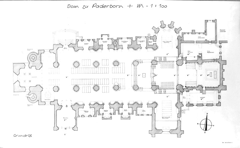 Grundriss des Paderborner Domes, angefertigt von Architekturbüro Dipl.-Ing. Heinrich Stiegemann, Warstein